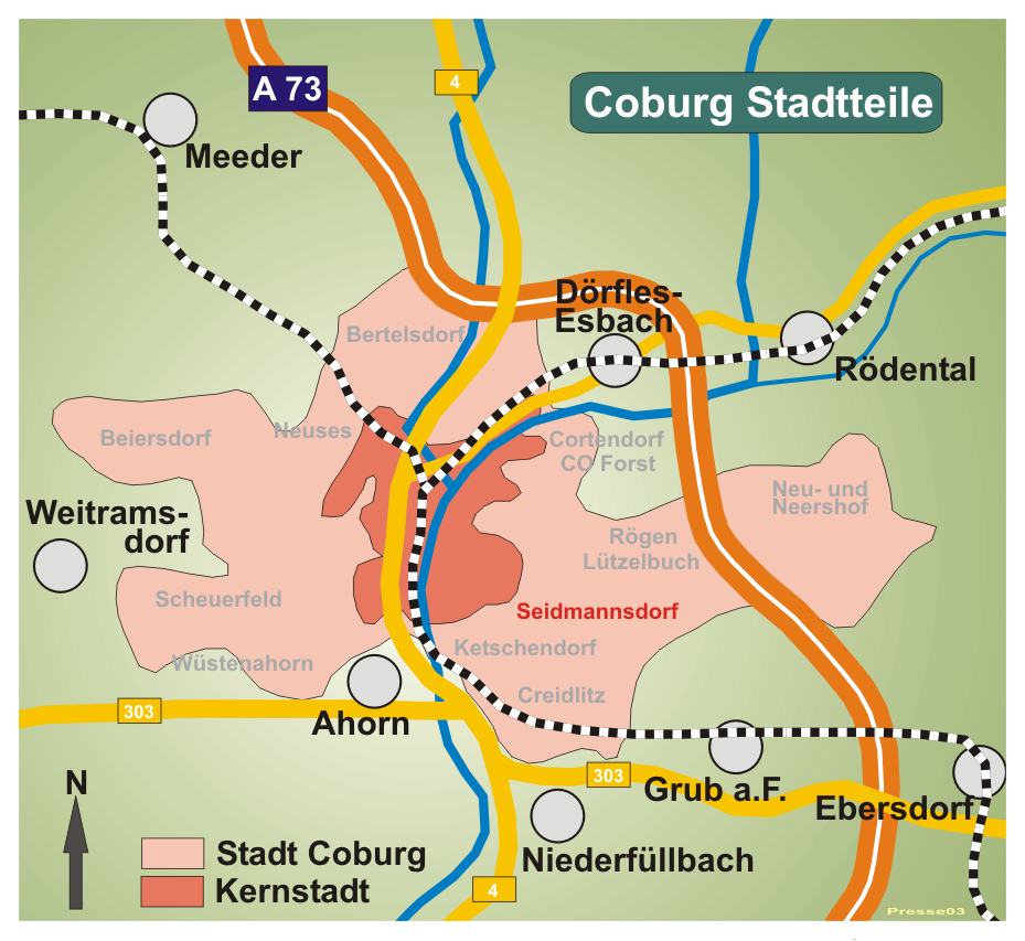 Karte von Coburg, Stadtteil Seidmannsdorf